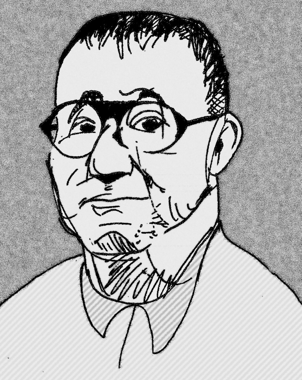 Bertolt Brecht - disegno a tecnica mista (...penna e gimp!)